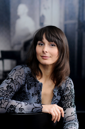 Zdenka Žádníková - Volencová (nar. 1974) je česká herečka.